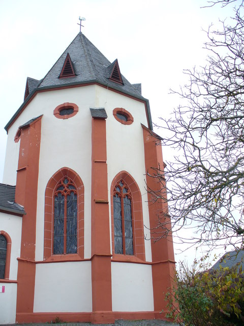 Kapelle in der Marienburg